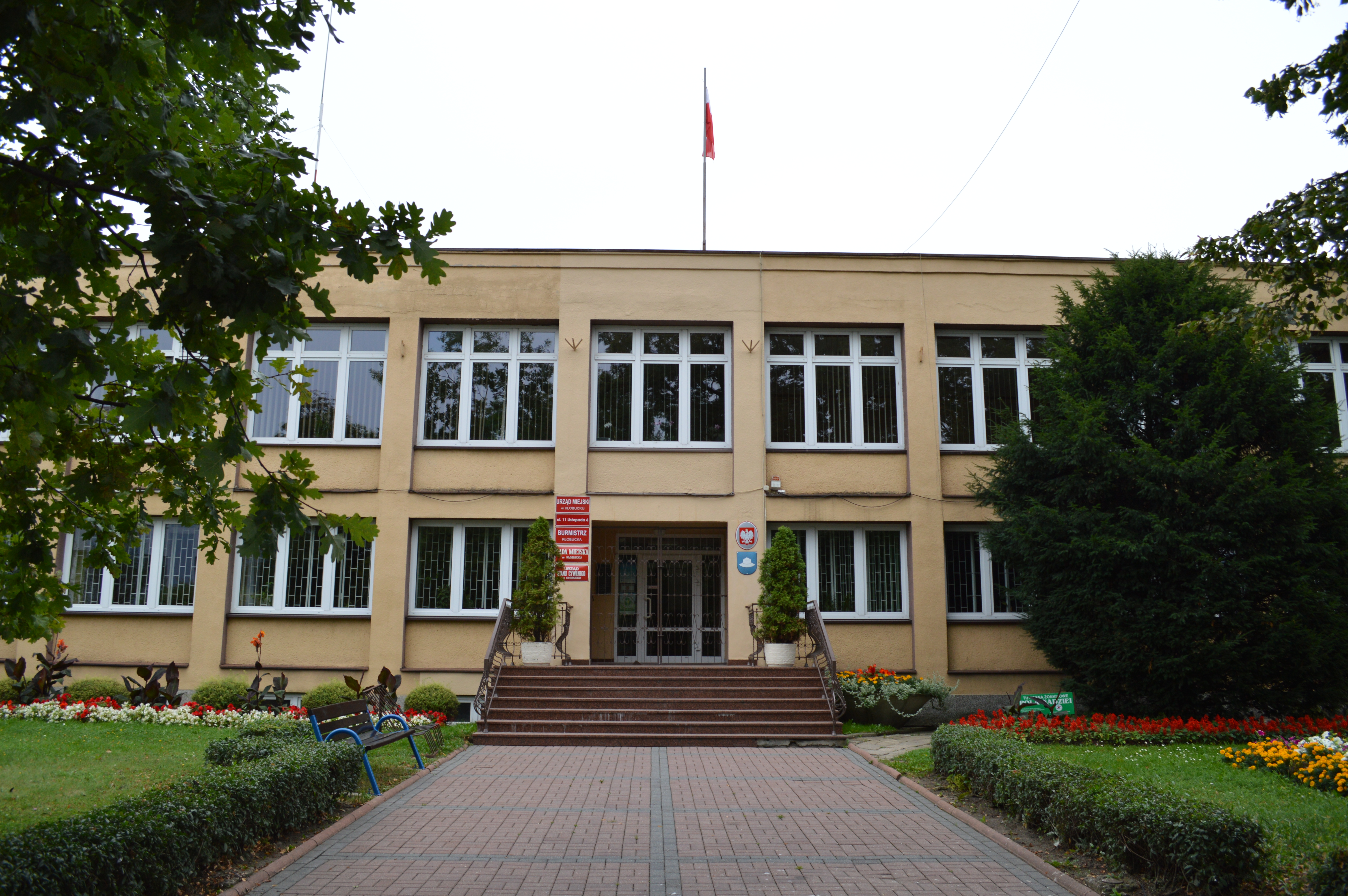 Siedziba Urzędu Miejskiego, Burmistrza, Rady Miejskiej i Urzędu Stanu Cywilnego w Kłobucku